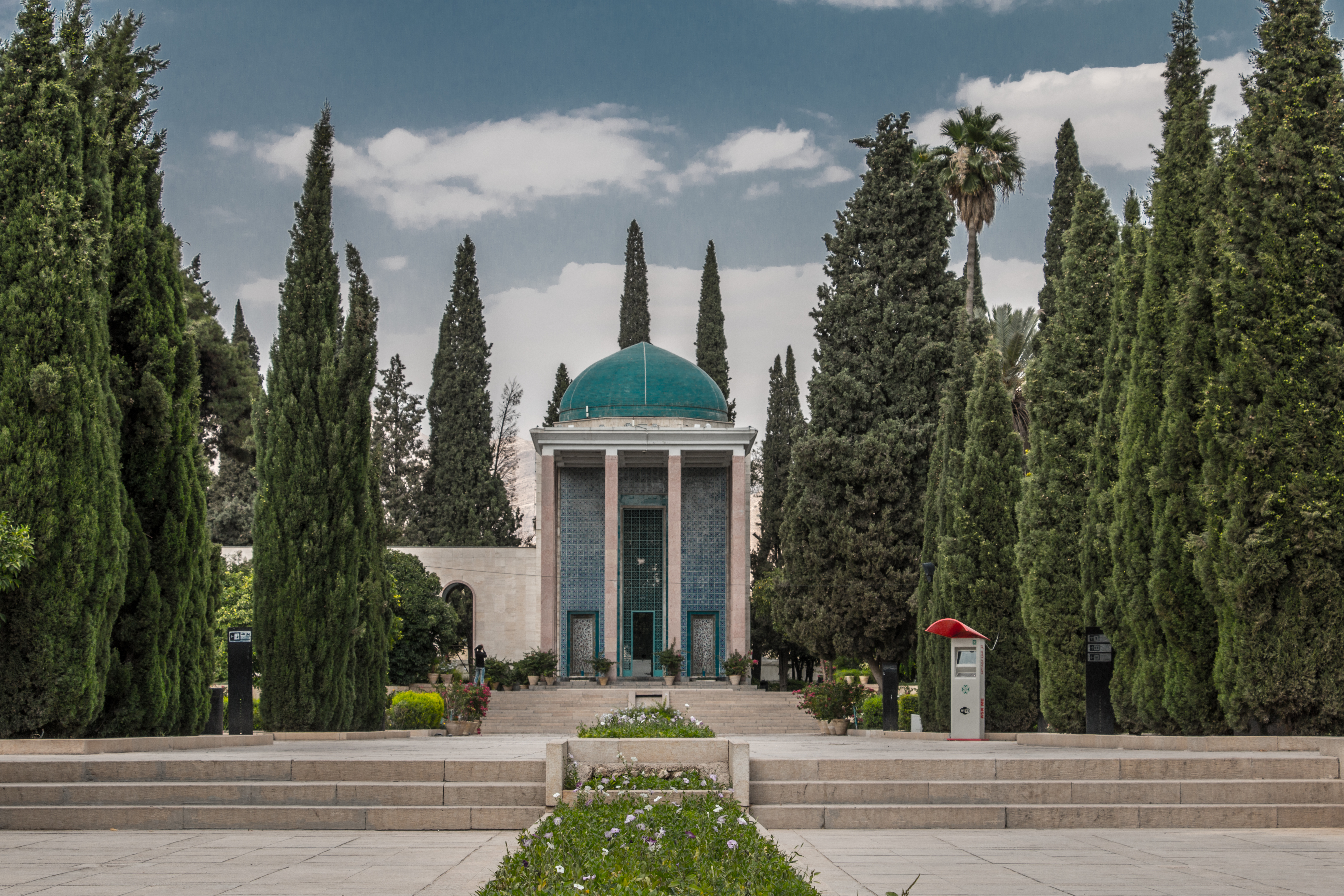 سعدیه